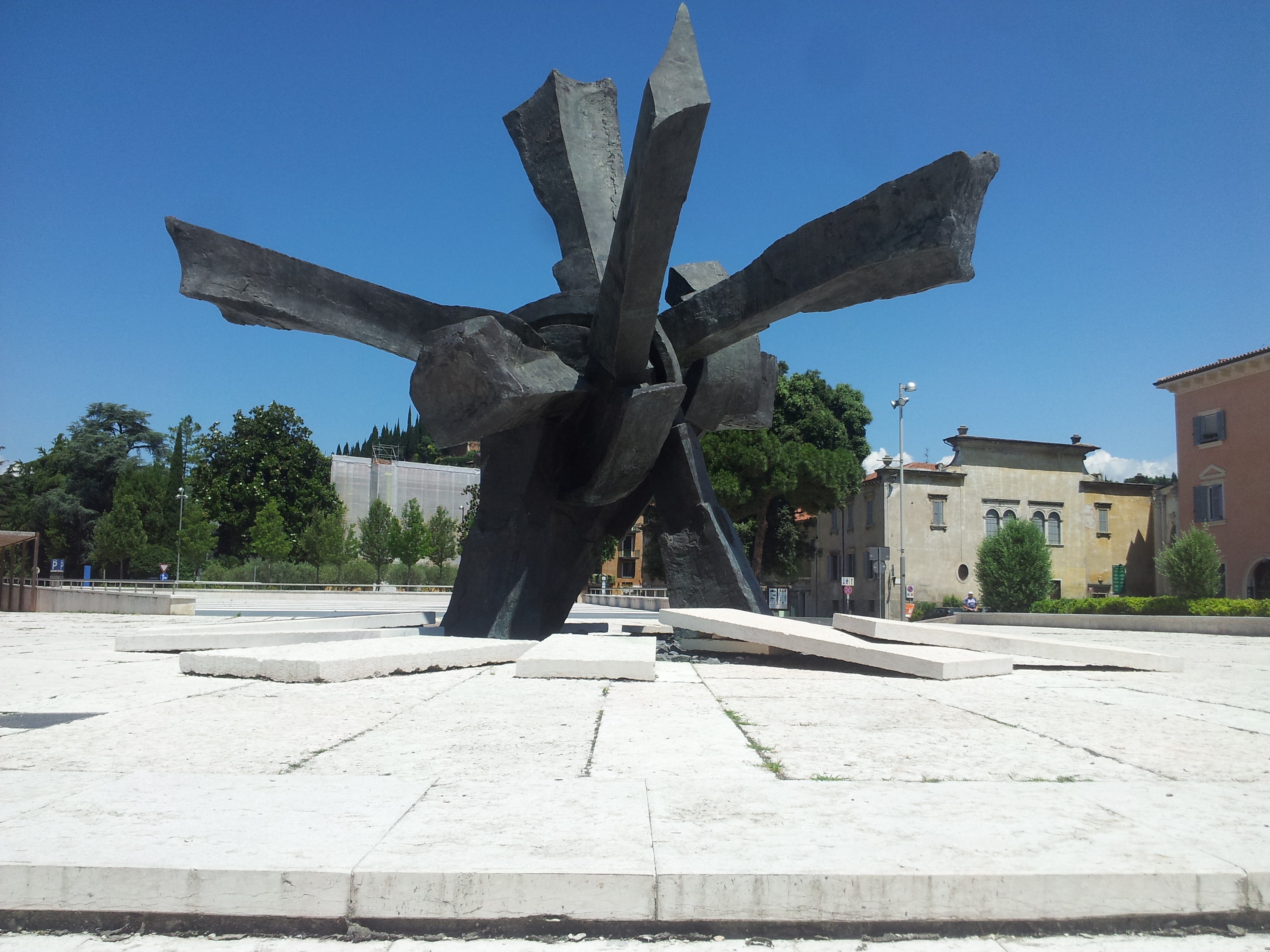 Scultura di Pino Castagna installata in Piazza Isolo a Verona nel 2009 in memoria delle vittime della Shoah.